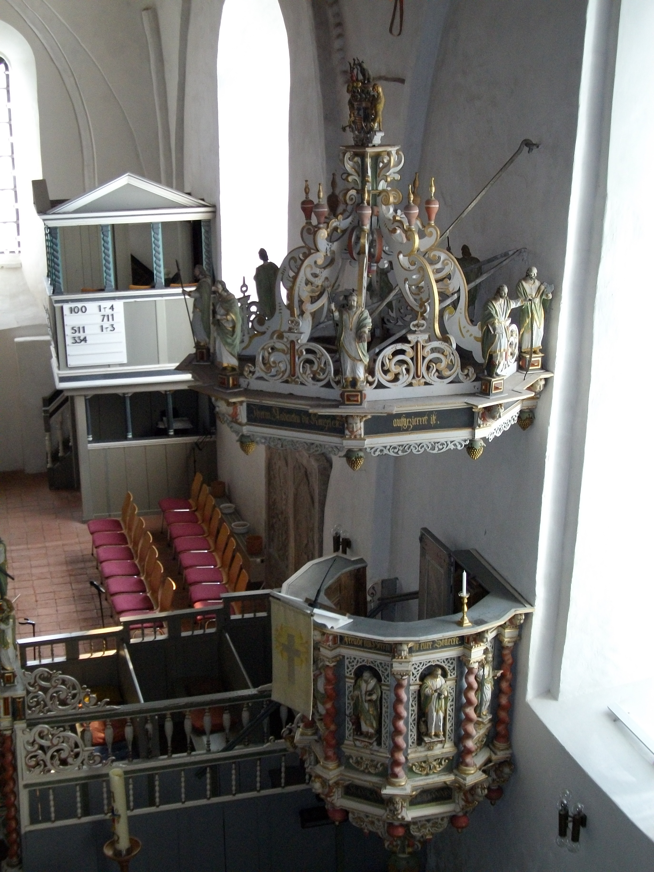 Kanzel der St.-Bartholomäus-Kirche in Dornum